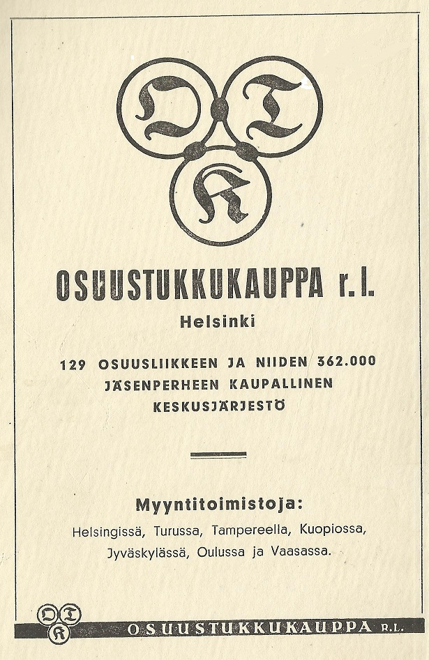 Kalenterin kansisivulla oleva OTK:n mainos